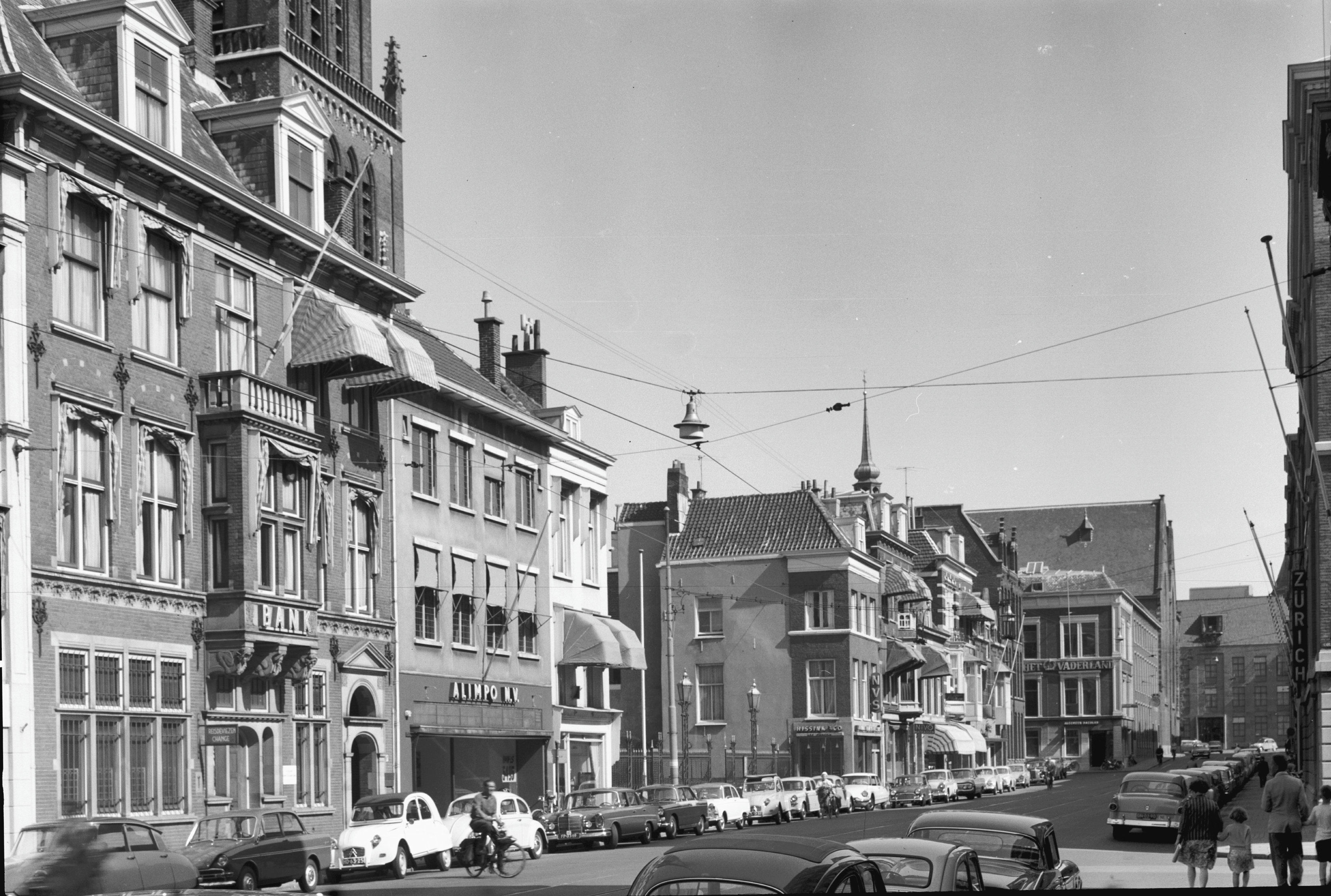 straatbeeld